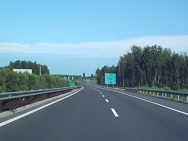 北京市六环路，CNDF08在2004年拍照的图片